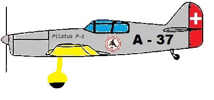 Pilatus P-1 farbe seite